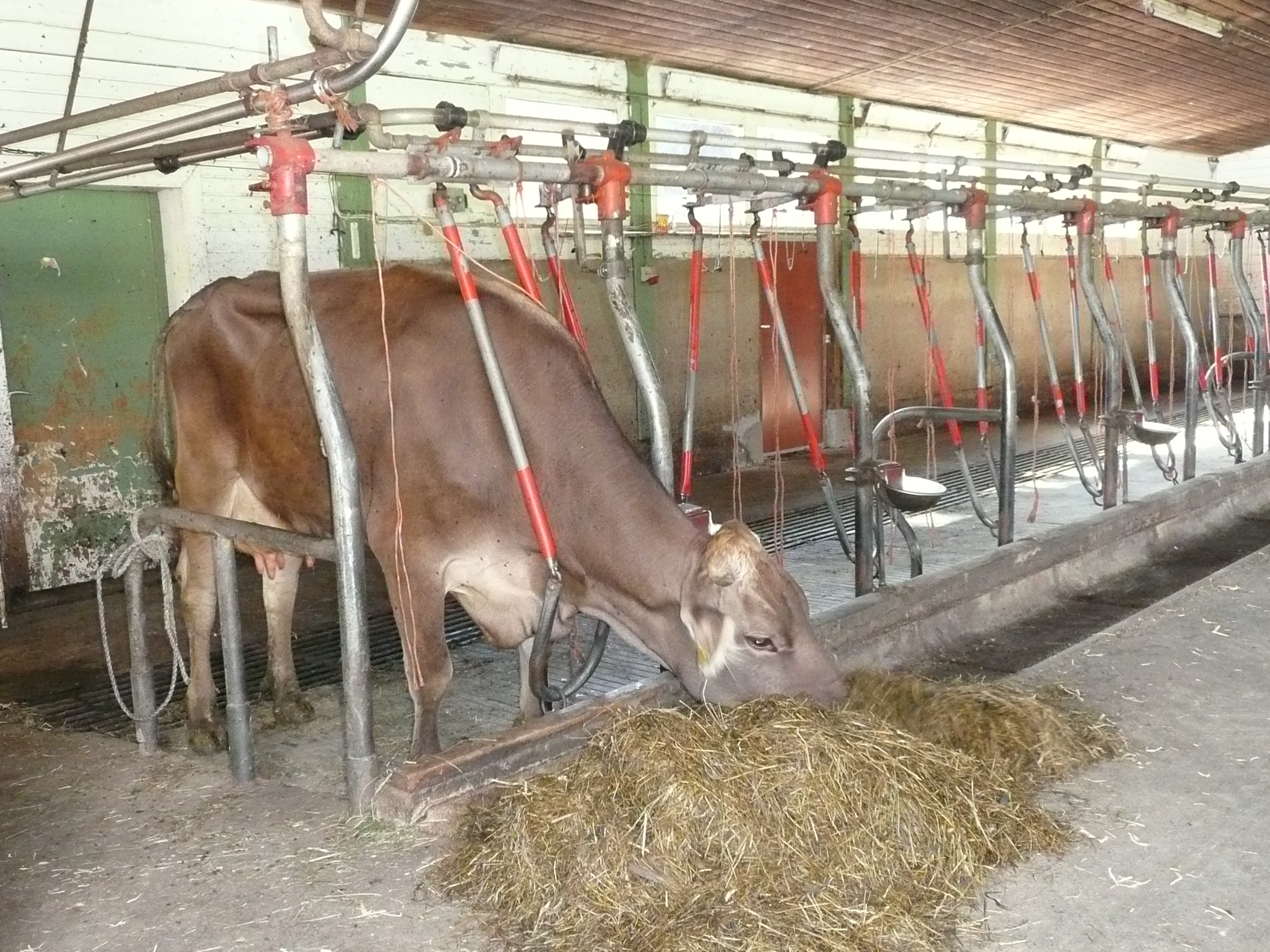 Anbindestall im Allgäu, Grassilage als Futter.